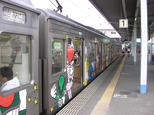 マンガッタンライナー